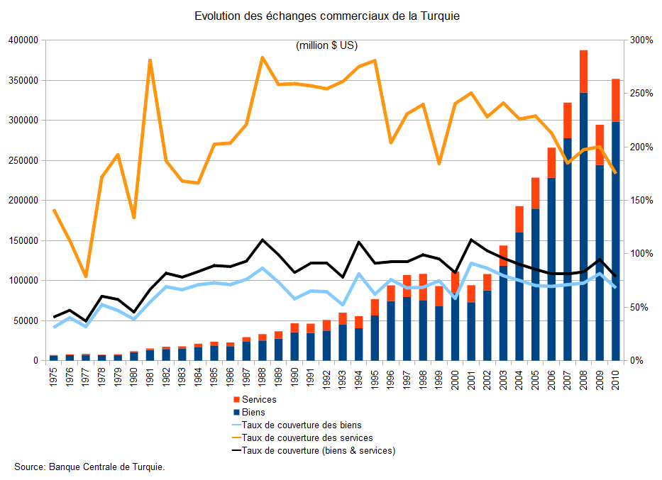 Volume des échanges de la Turquie - Source: Banque Centrale de Turquie